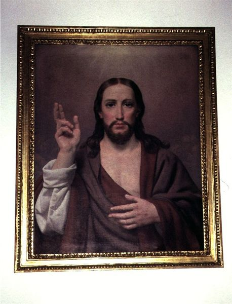 Damsholte Kirke Møn Kommune, Denmark; Tidligere altertavlemaleri af Eckersberg.